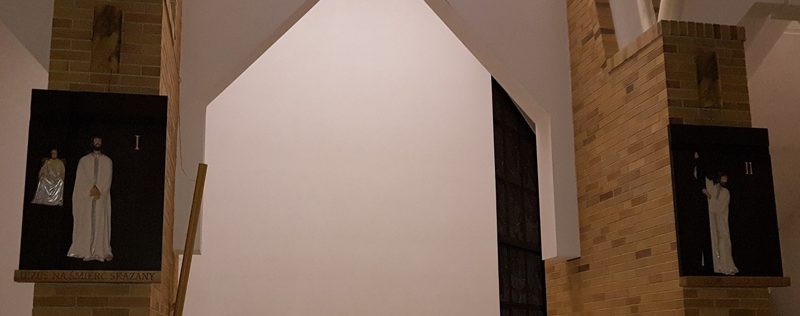 Droga Krzyżowa, 2018